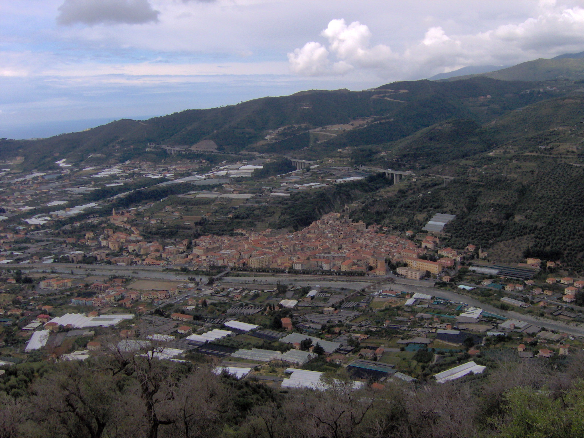 Taggia (IM), vista dalla collina